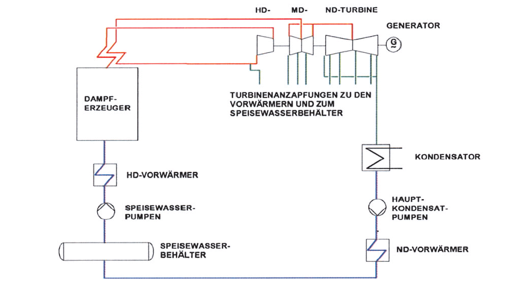 Typischer Dampfkreislauf eines Kohlekraftwerkes